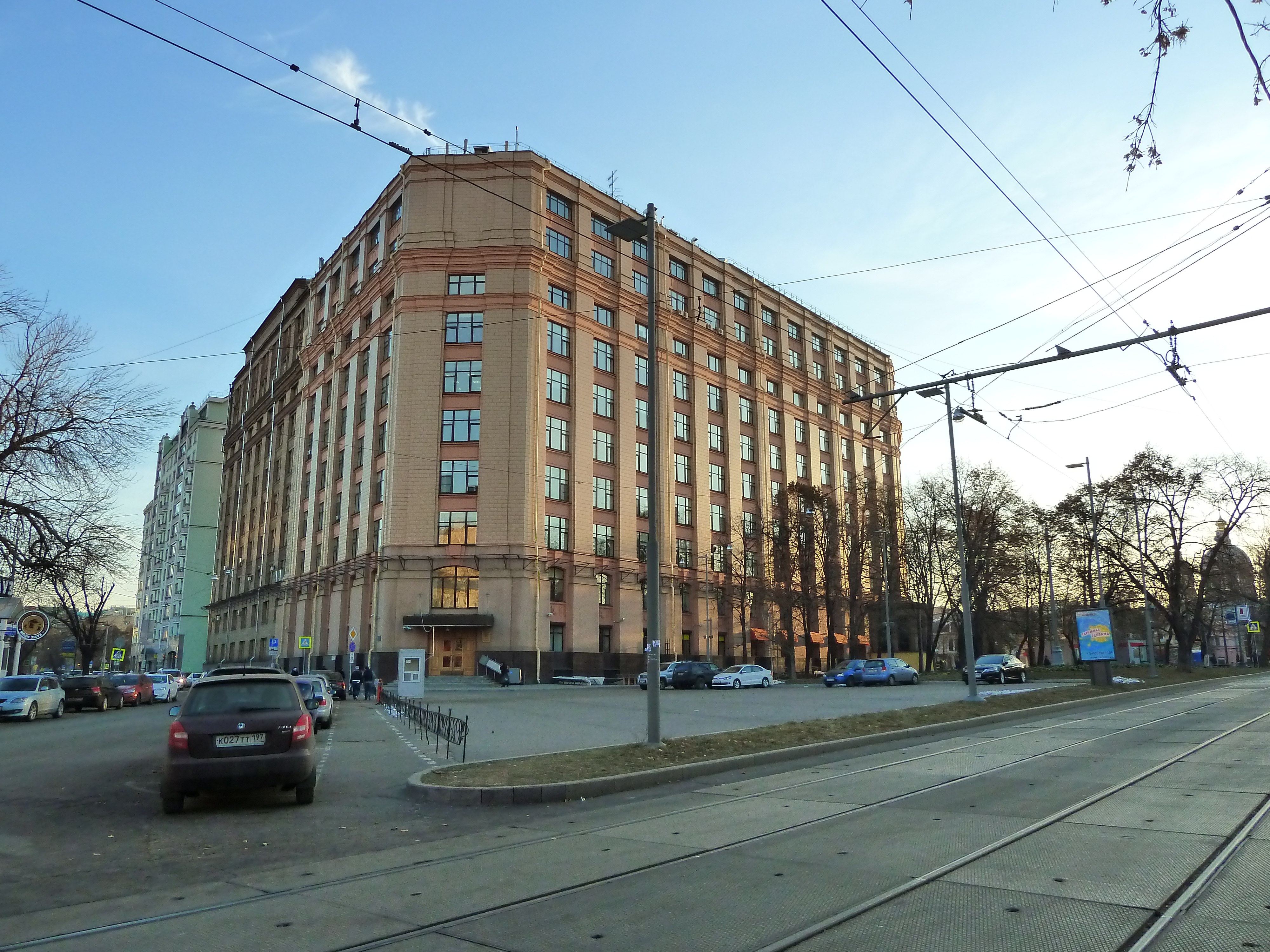 Госфонд телевизионных и радиопрограмм (Москва и Московская область, Москва, Пятницкая улица, 25, строение 1)